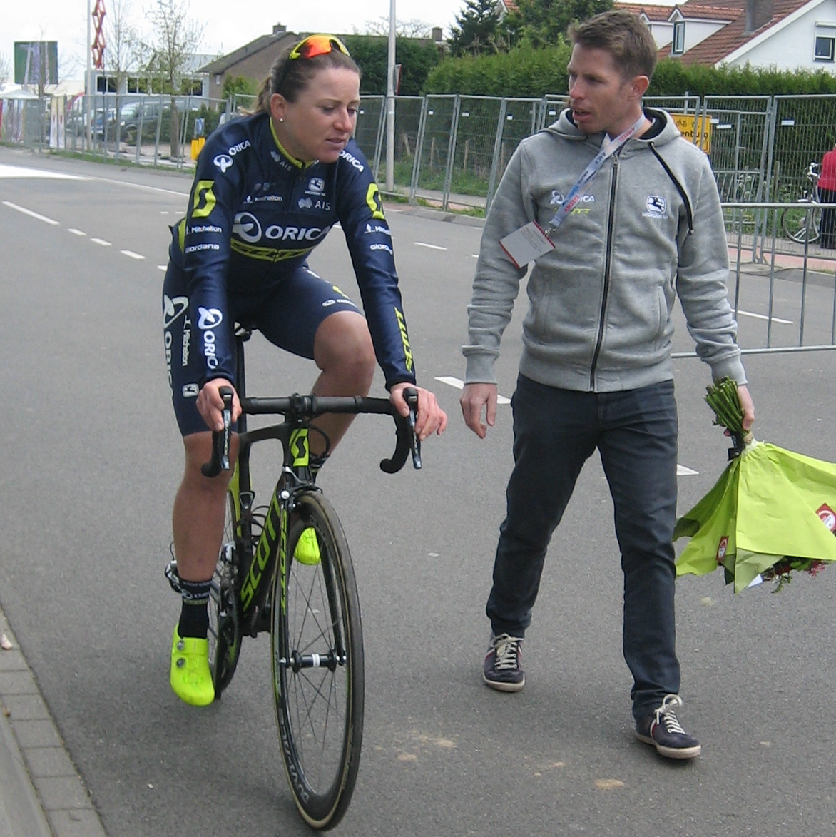 Na de finish van de Amstel Gold Race Ladies Edition 2017.